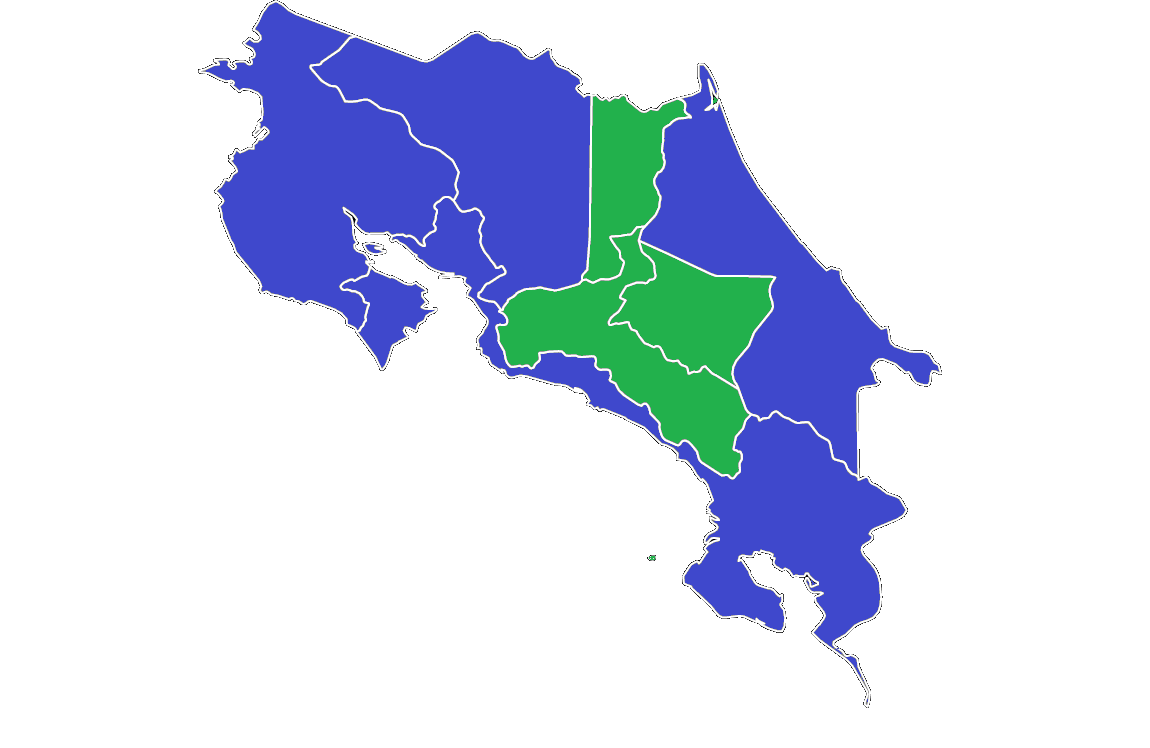 Resultado de las elecciones presidenciales de 1998 por provincia, verde PLN y azul PUSc